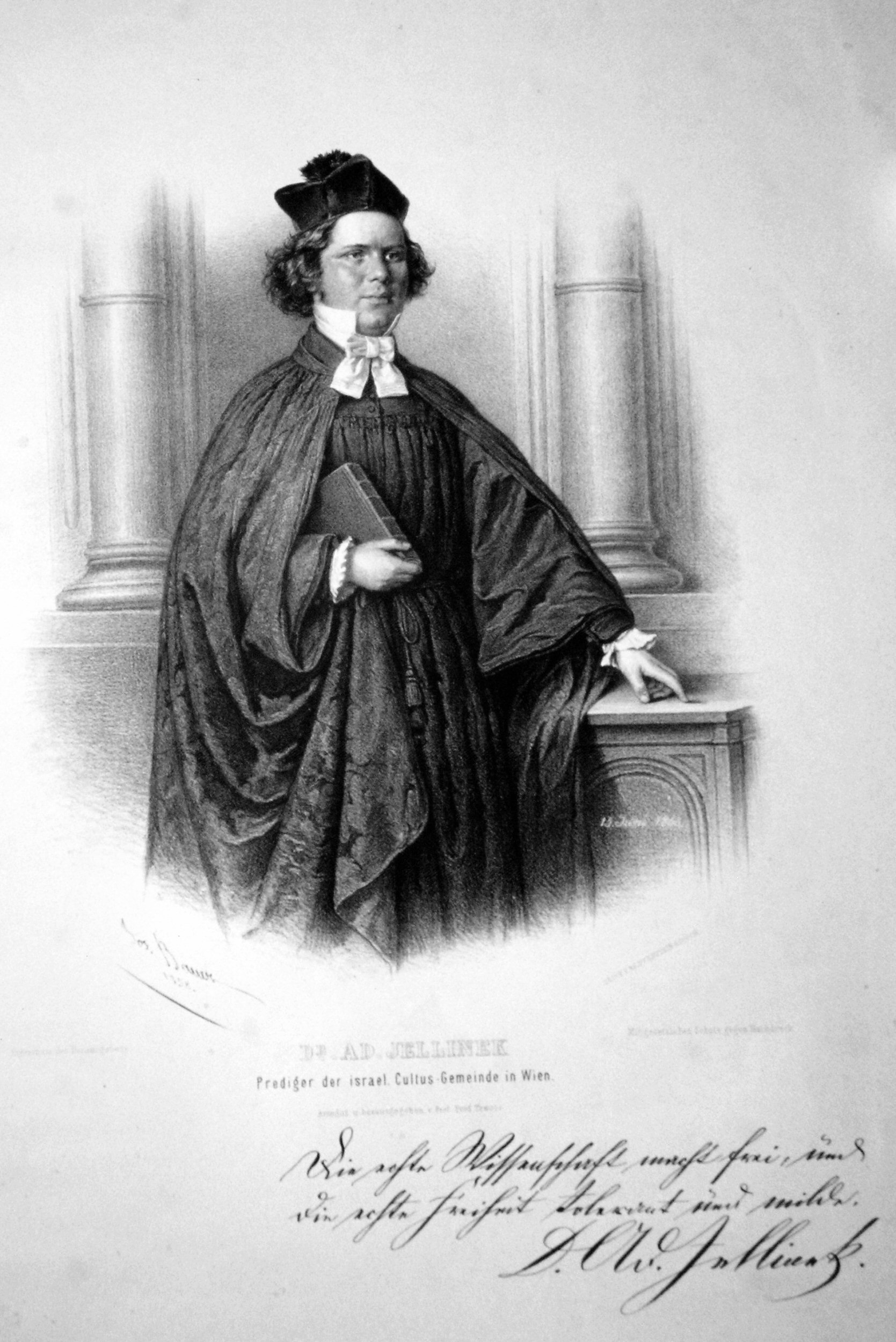 Adolf Jellinek, Lithographie von Josef Bauer, 1858